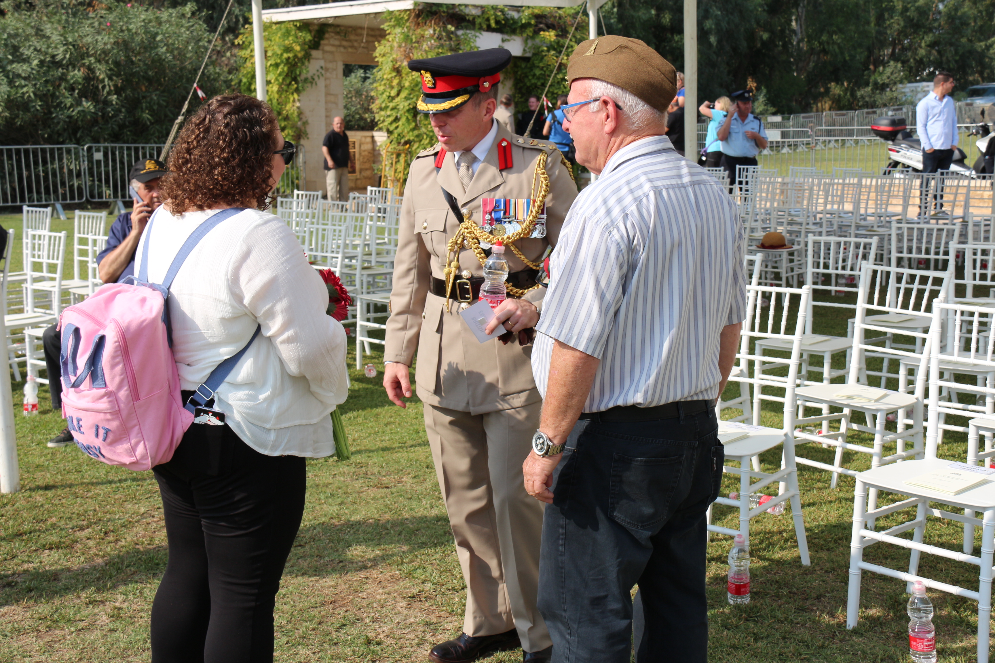 טקס יום הזיכרון לחללי הממלכה הבריטית נובמבר 2019